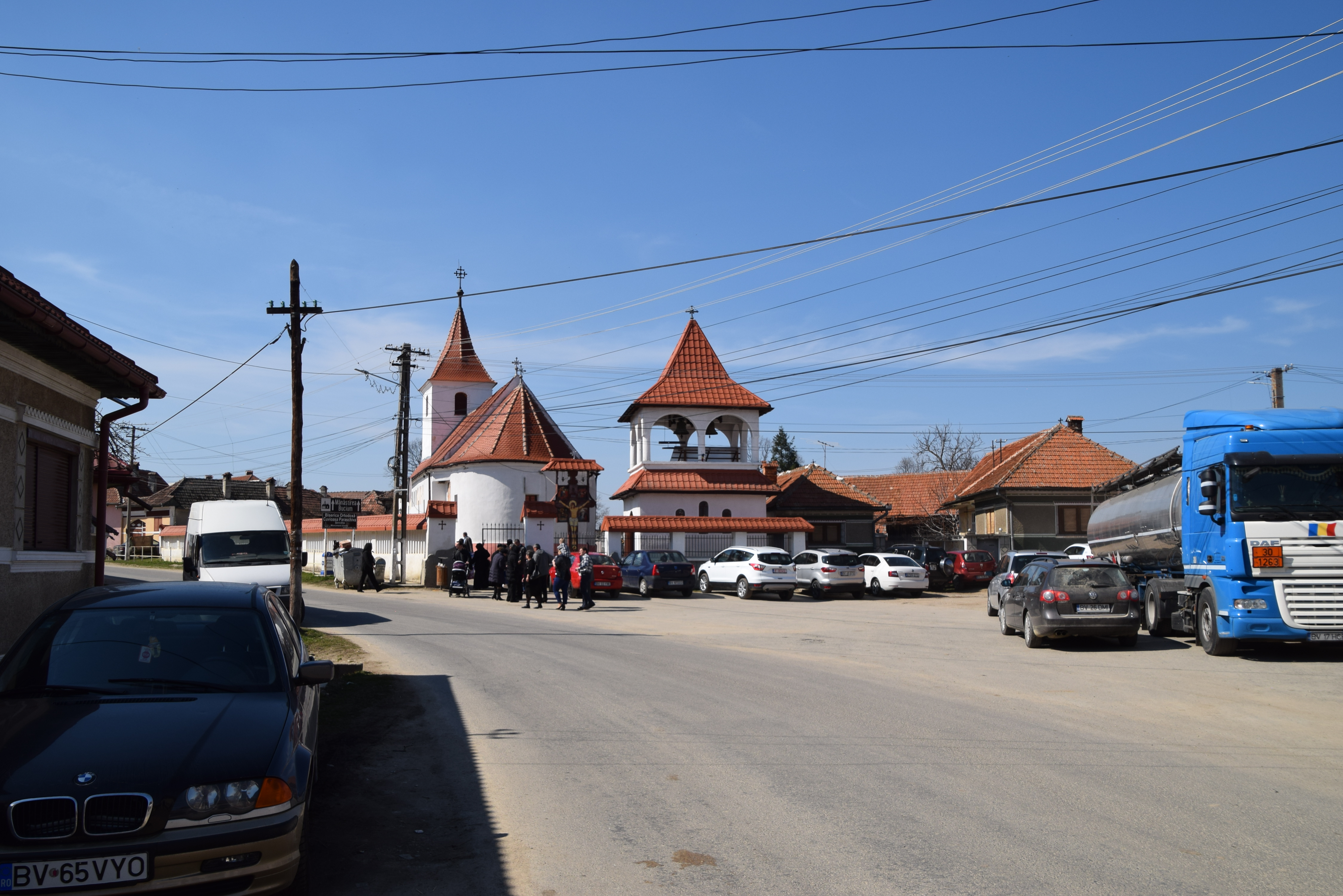 Biserica „Cuvioasa Paraschiva”